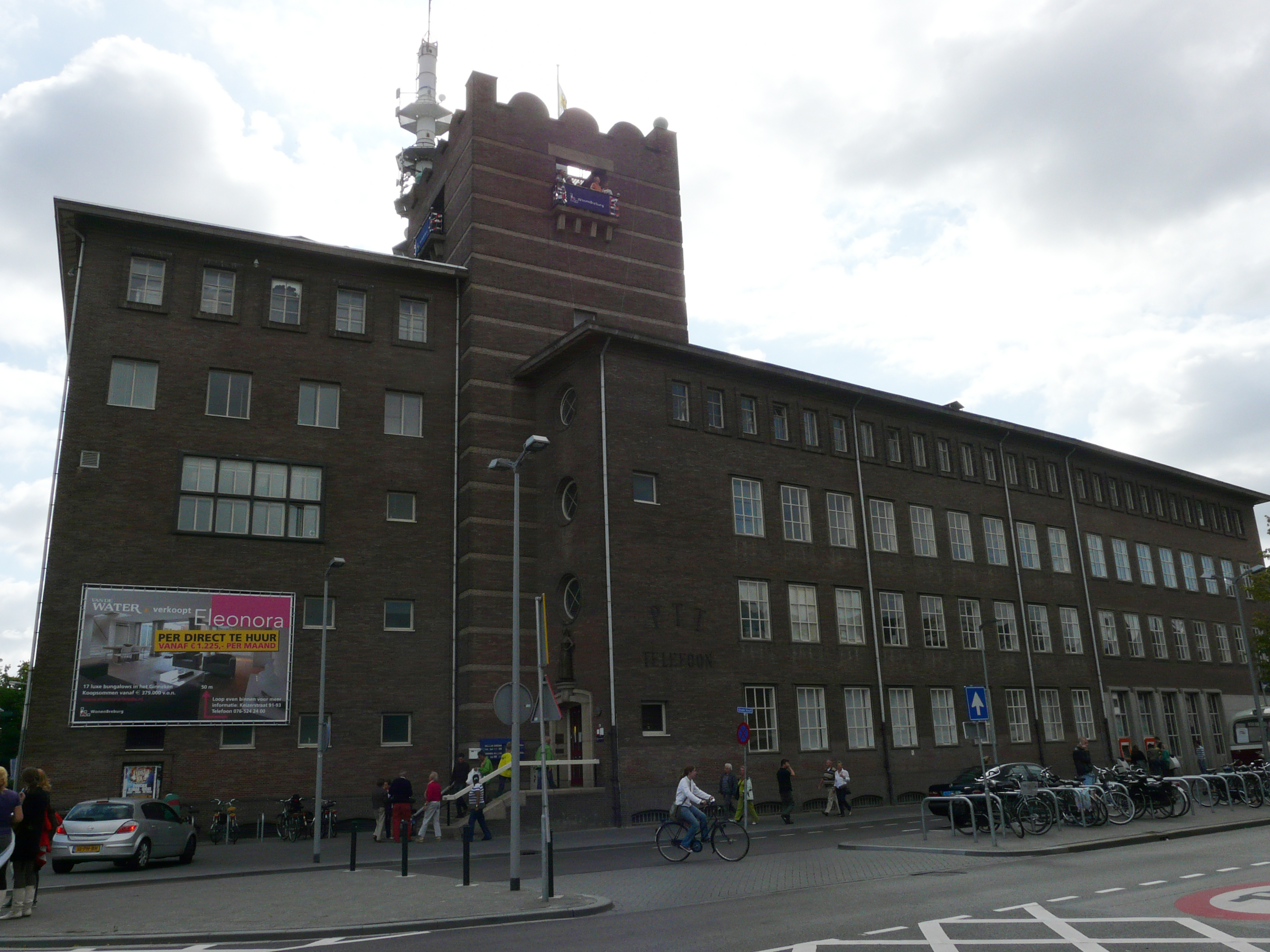 Voormalige Postkantoor gevestigd aan de Oude Vest in het centrum van Breda